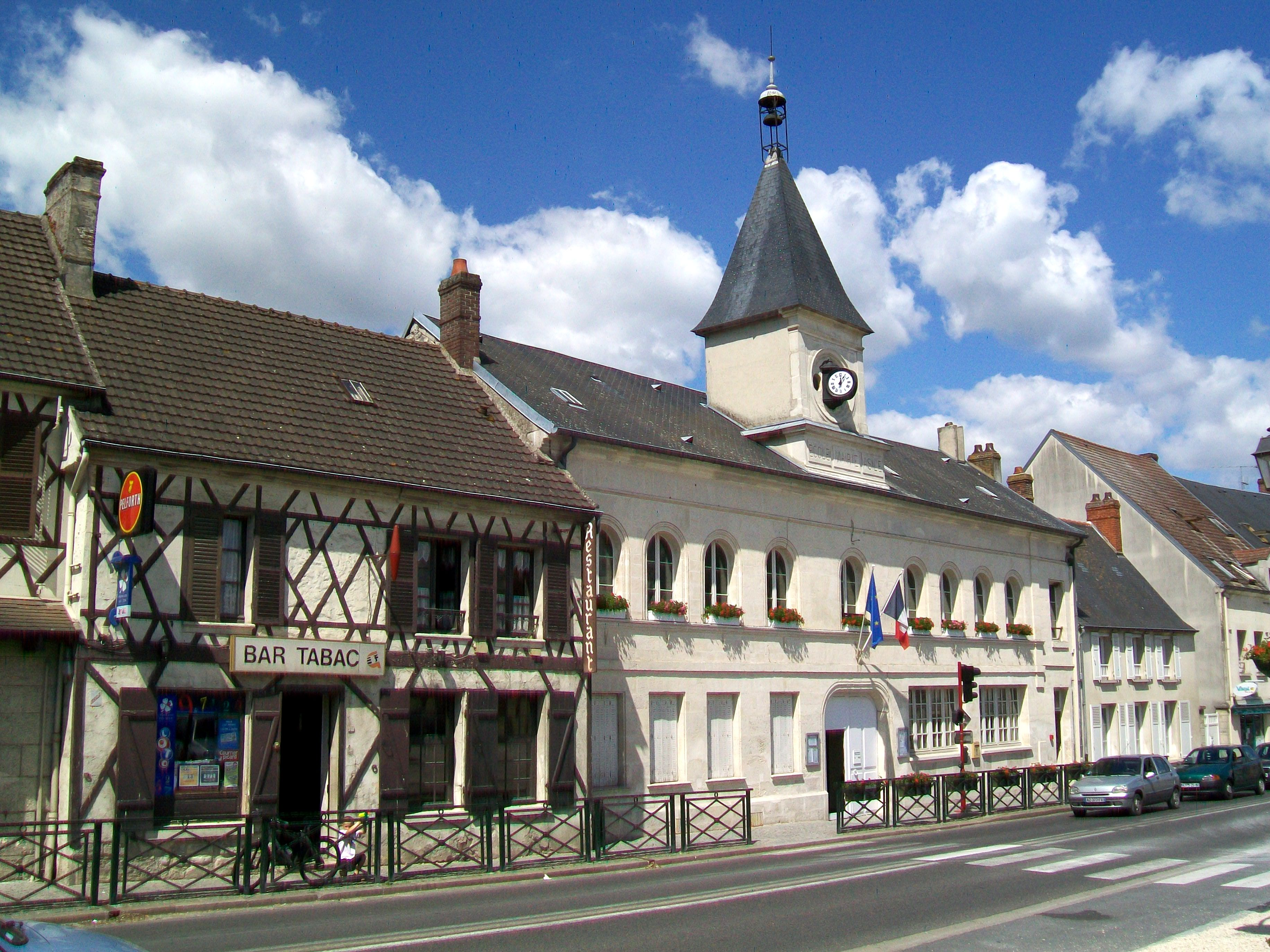 Auberge et mairie (construite en 1847), rue du général de Gaulle (D 1017).